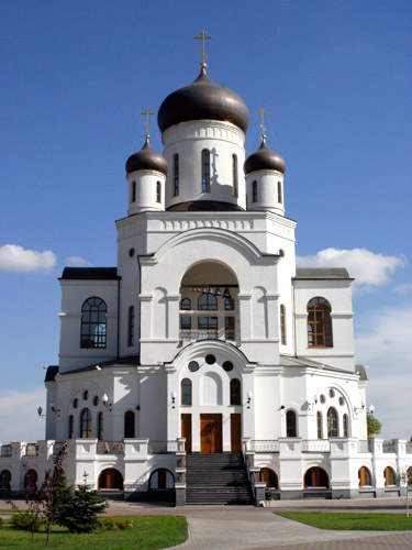 Фотография Храма Рождества Христова в Мытищах